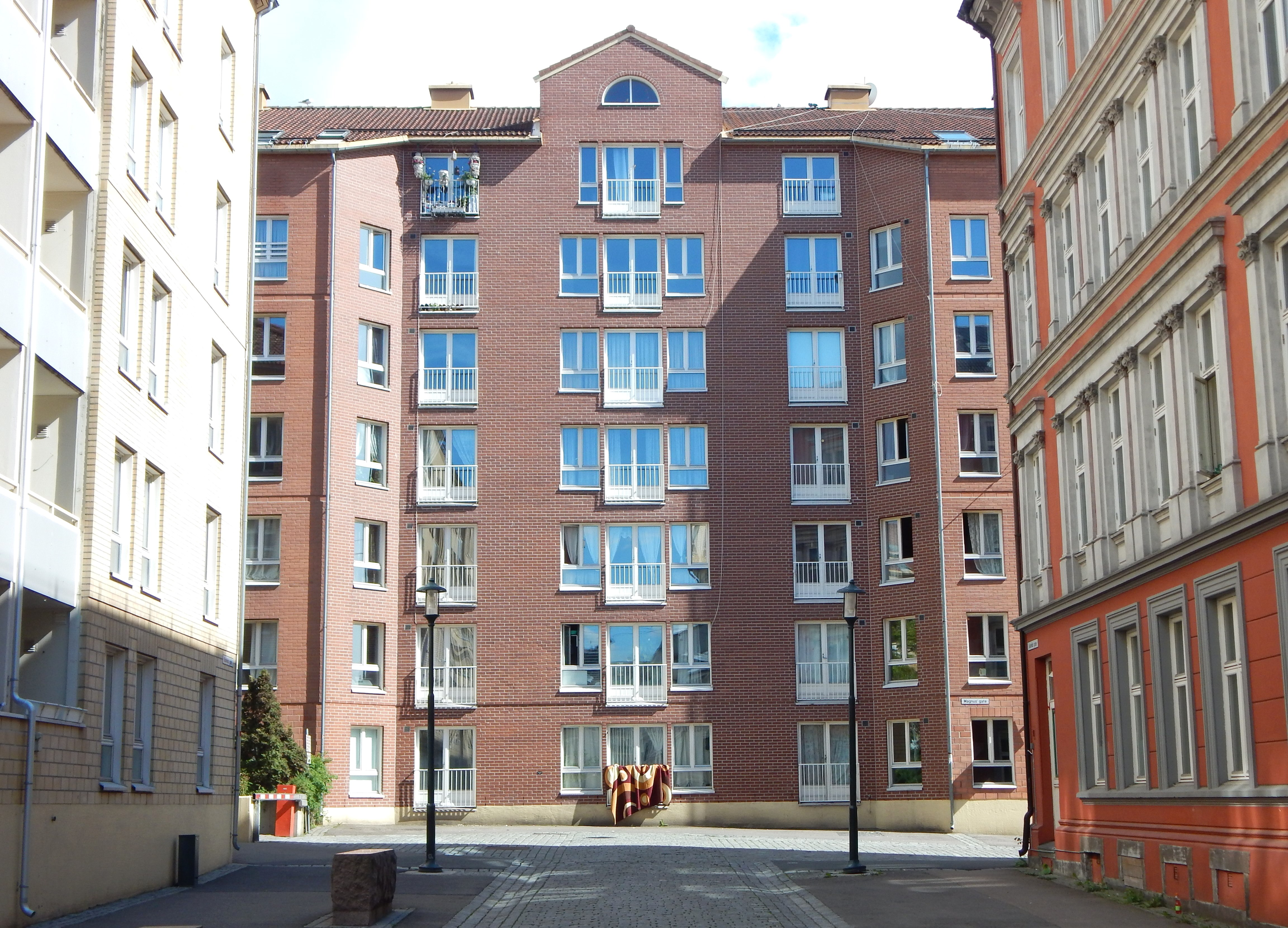 Magnus' gate sett fra Gunhilds gate